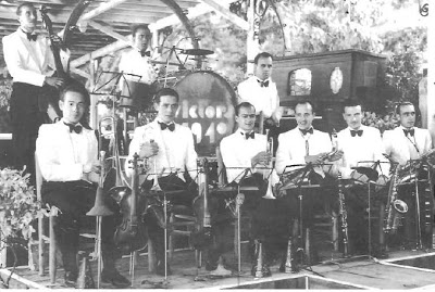 L'Orquestra Victors als Banys de Sant Elm de Sant Feliu de Guíxols el 1940